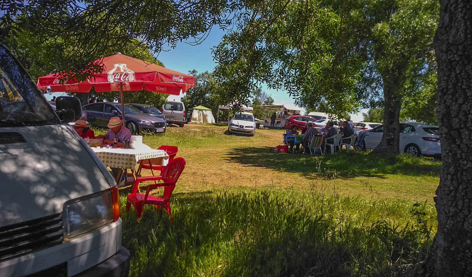 Fiestas patronales de Pereña de la Ribera en mayo, Salamanca, España